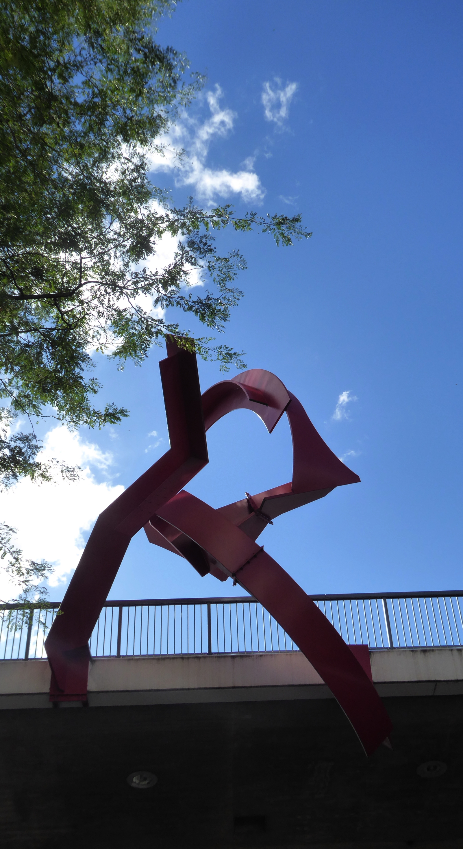 Wikimedia, Paul Suter (1926-2009) Bildhauer, Plastiker, 1971-74, Drei Monumentalskulpturen,Steinenschanze, Basel